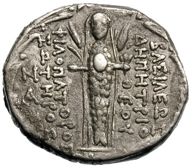 Silber-Münze des Demetrius III. mit Bild der Derketo von Askalon